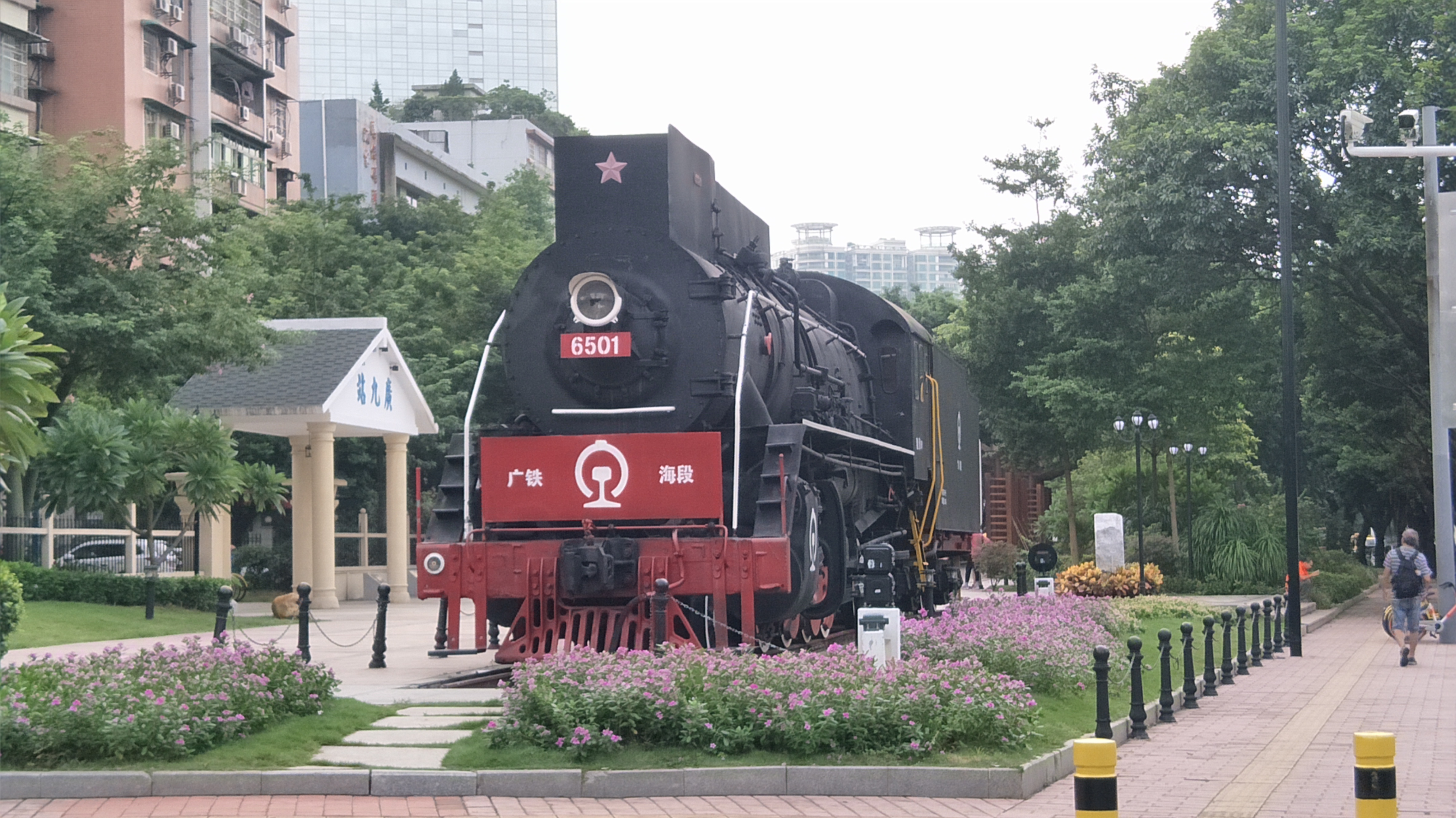 在大沙头铁路公园（大沙头广九车站旧址）展示的建设型6501号蒸汽机车